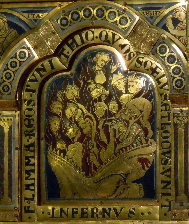 Verduner Altar, 17. Spalte "Hölle", Stift Klosterneuburg